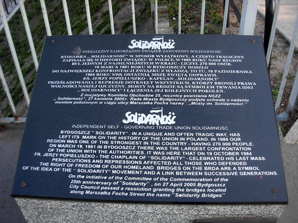 Mosty Solidarności w Bydgoszczy